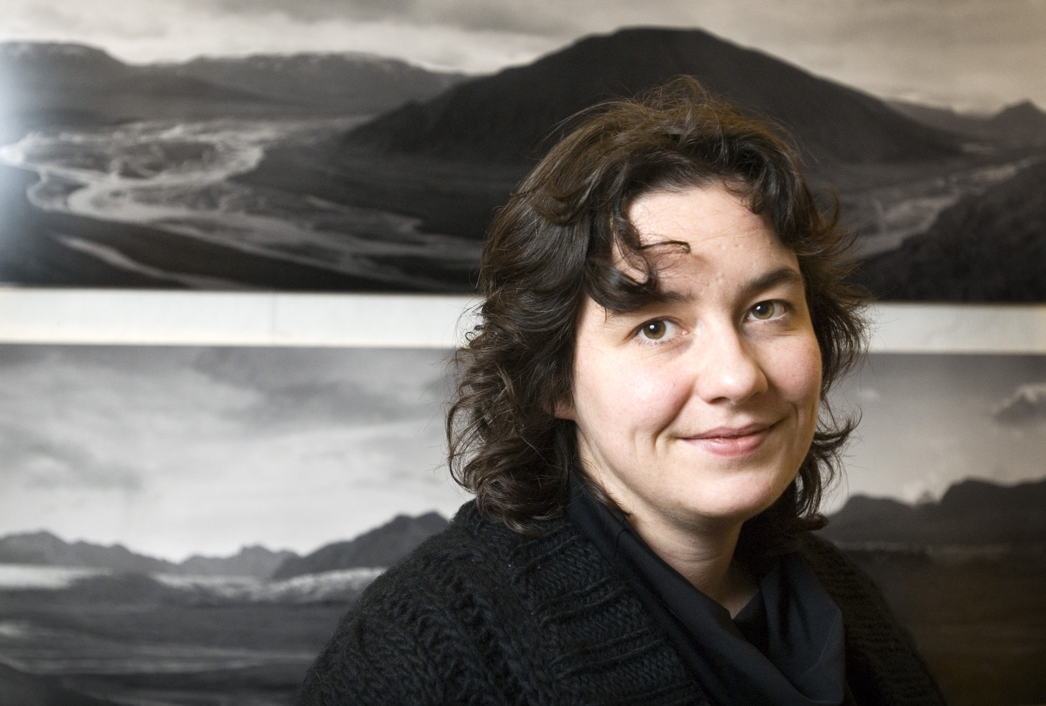 Auður Jónsdóttir, nominerad till Nordiska rådets litteraturpris 2006.